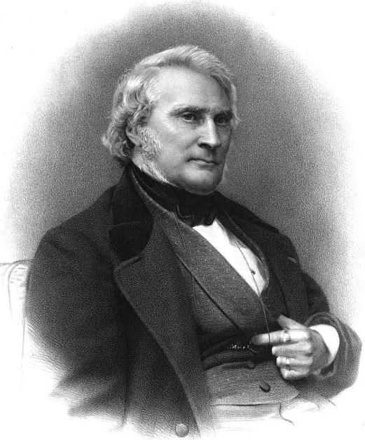 Louis-Marie, comte de Carné-Marcein.